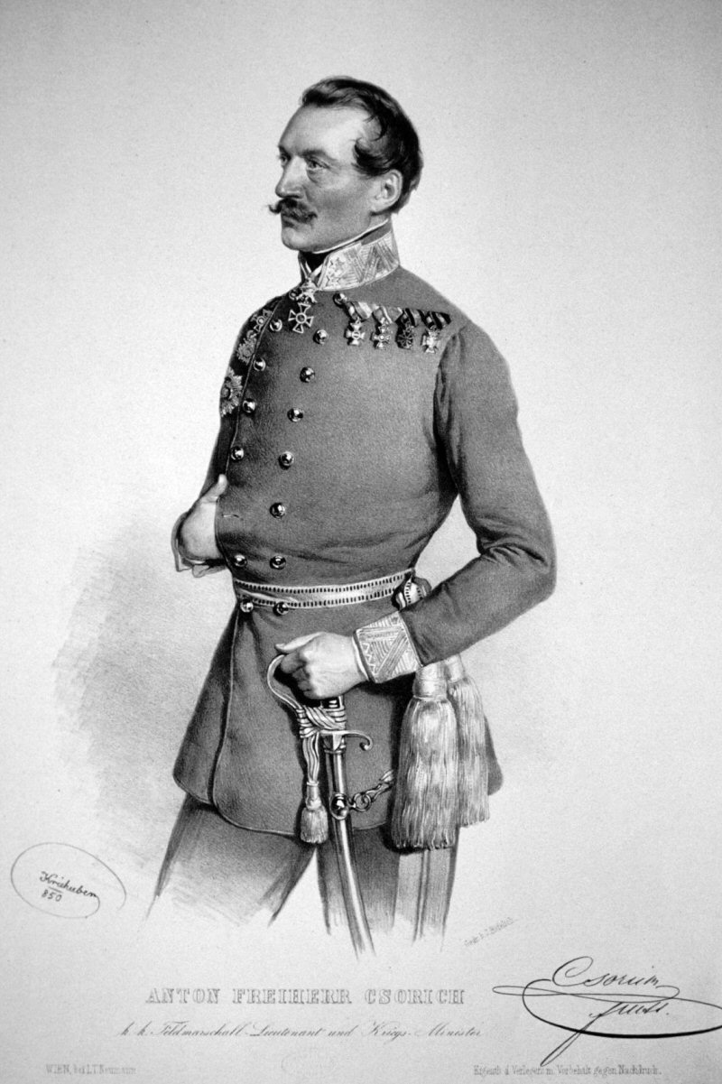 Anton Csorich von Monte Creto császári és királyi altábornagy, osztrák hadügyminiszter – Joseph Kriehuber litográfiája (1850)